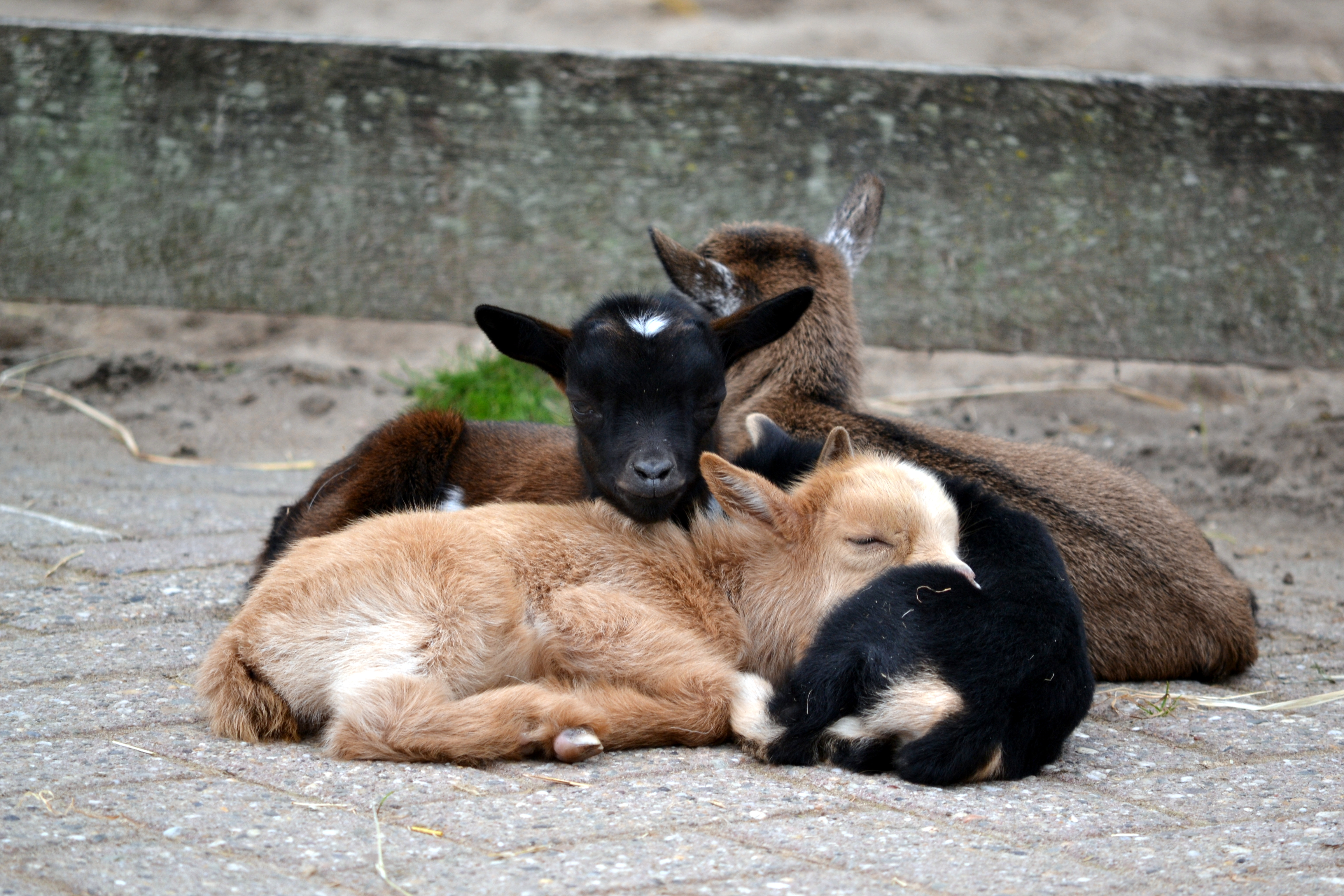 Deze foto is gemaakt tijdens een bezoek aan kinderboerderij De Kooi (Rotterdam). This picture was taken during a visit to the petting zoo De Kooi (Rotterdam).